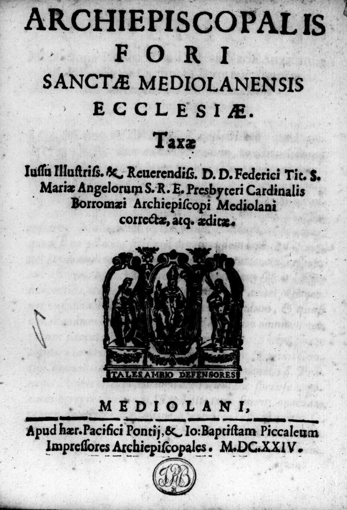 Frontespizio